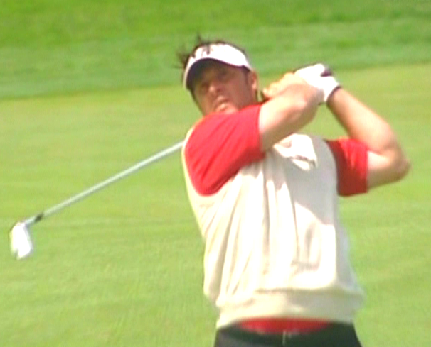 Bildbeschreibung: Emanuele Canonica bei den Austrian Open 2006 Quelle: eigene Aufnahme mit einer Handycam Fotograf/Zeichner: Boss 11:16, 13 June 2006 (UTC) Datum: 10.6.2006 Sonstiges: GNU